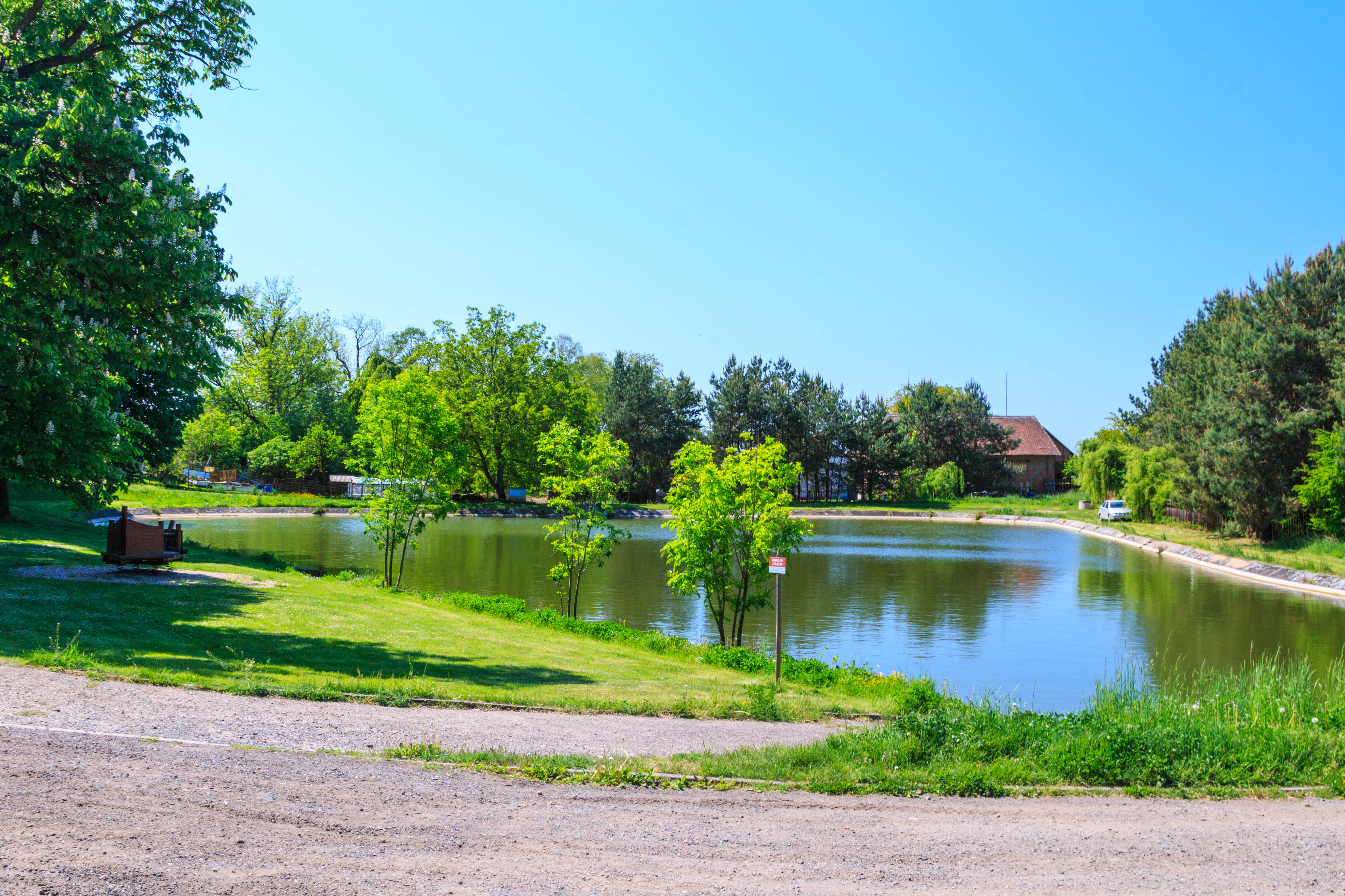 Rybník Kočár v Libčanech Project: Vodstvo.